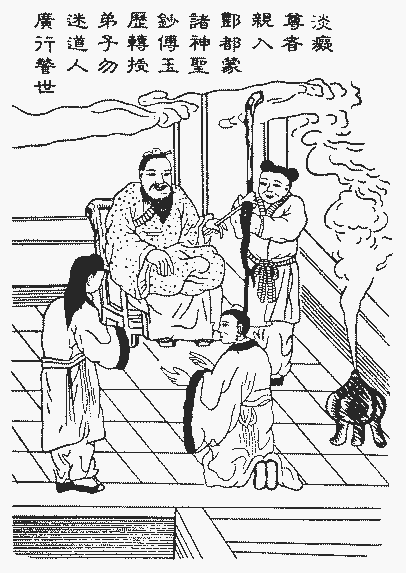 中文（台灣）: 玉歷寶鈔圖像之一